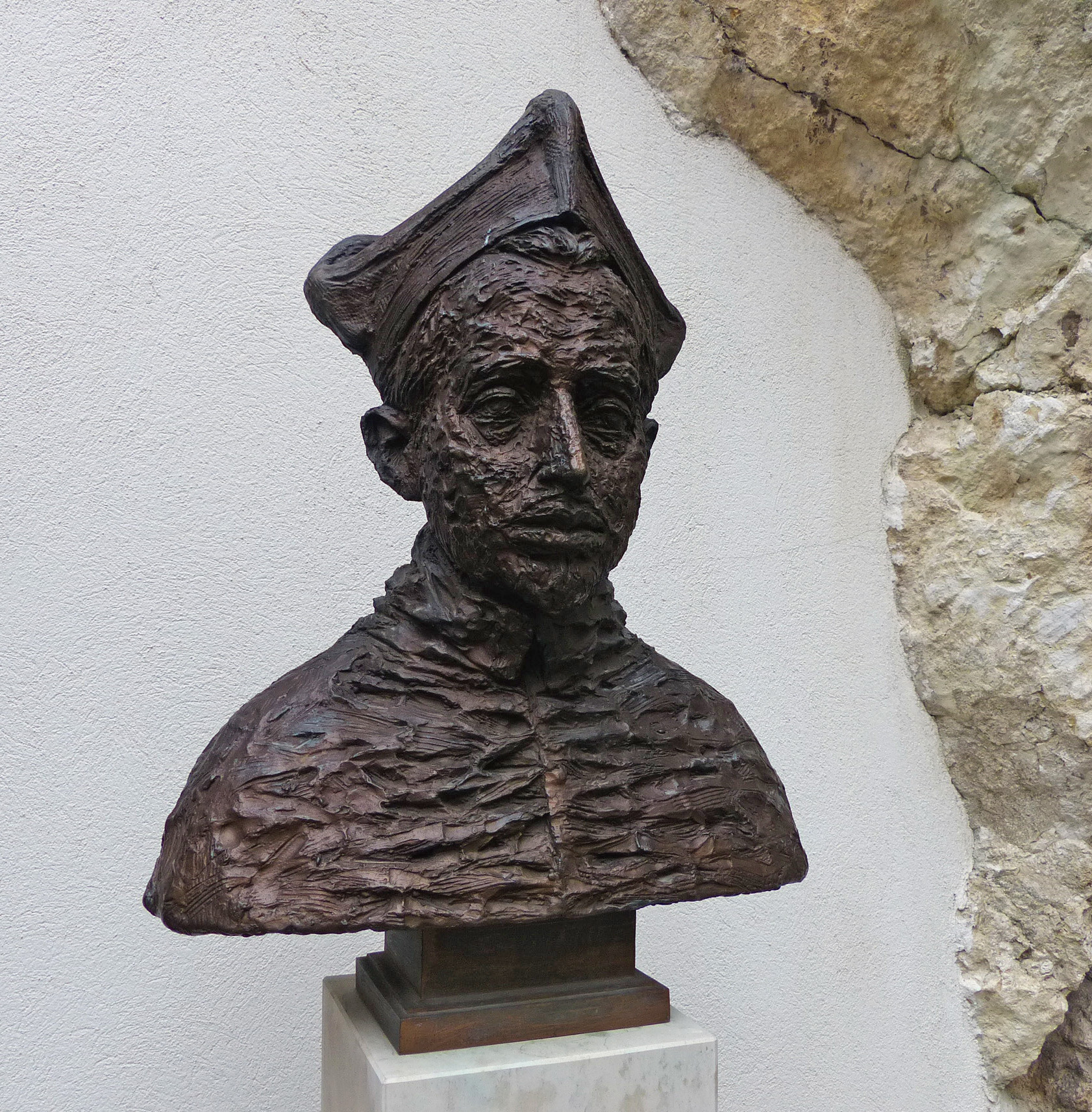 Busta zobrazující kardinála Františka Dietrichsteina; horní nádvoří zámku v Mikulově.